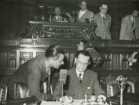 Prima seduta dell'Assemblea costituente ed elezione dei membri dell'Ufficio di Presidenza provvisorio